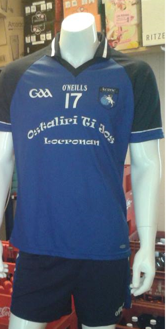 Le maillot du Kerne Football Gaélique